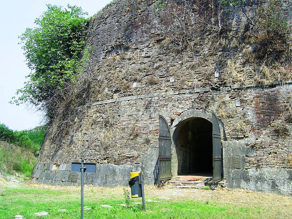 Palmanova